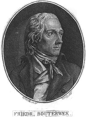 Немецкий философ и поэт Фридрих Бутервек (1766-1828)